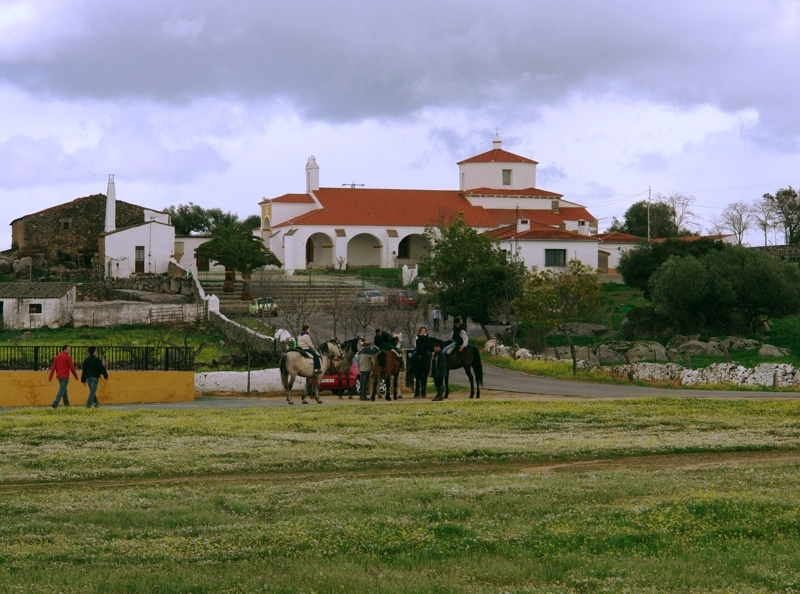 Ermita de la Virgen del Encinar, Ceclavín (Cáceres)